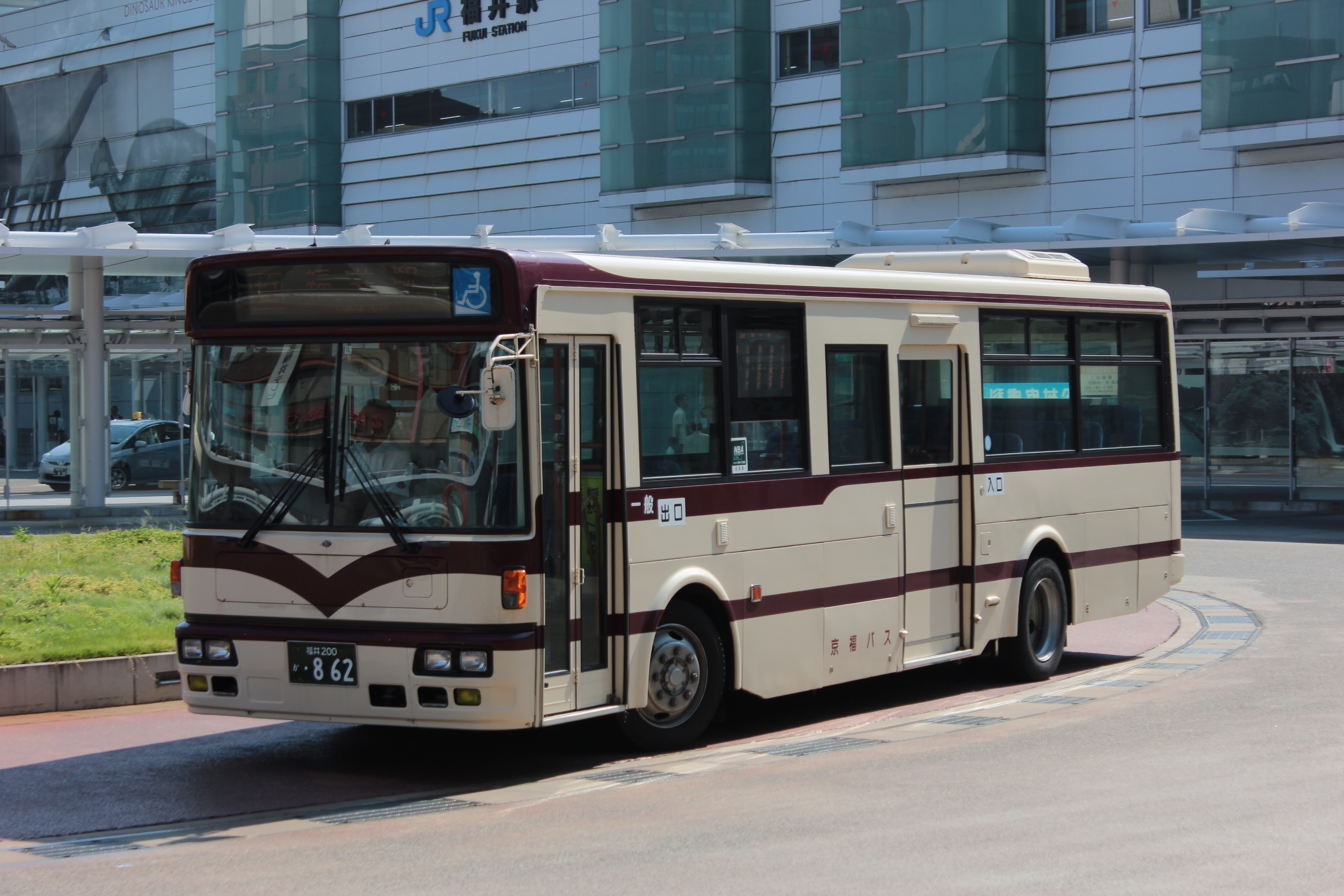 京福バスの日産ディーゼル・スペースランナーJP（KL-JP252LAN） Canon EOS Kiss X5